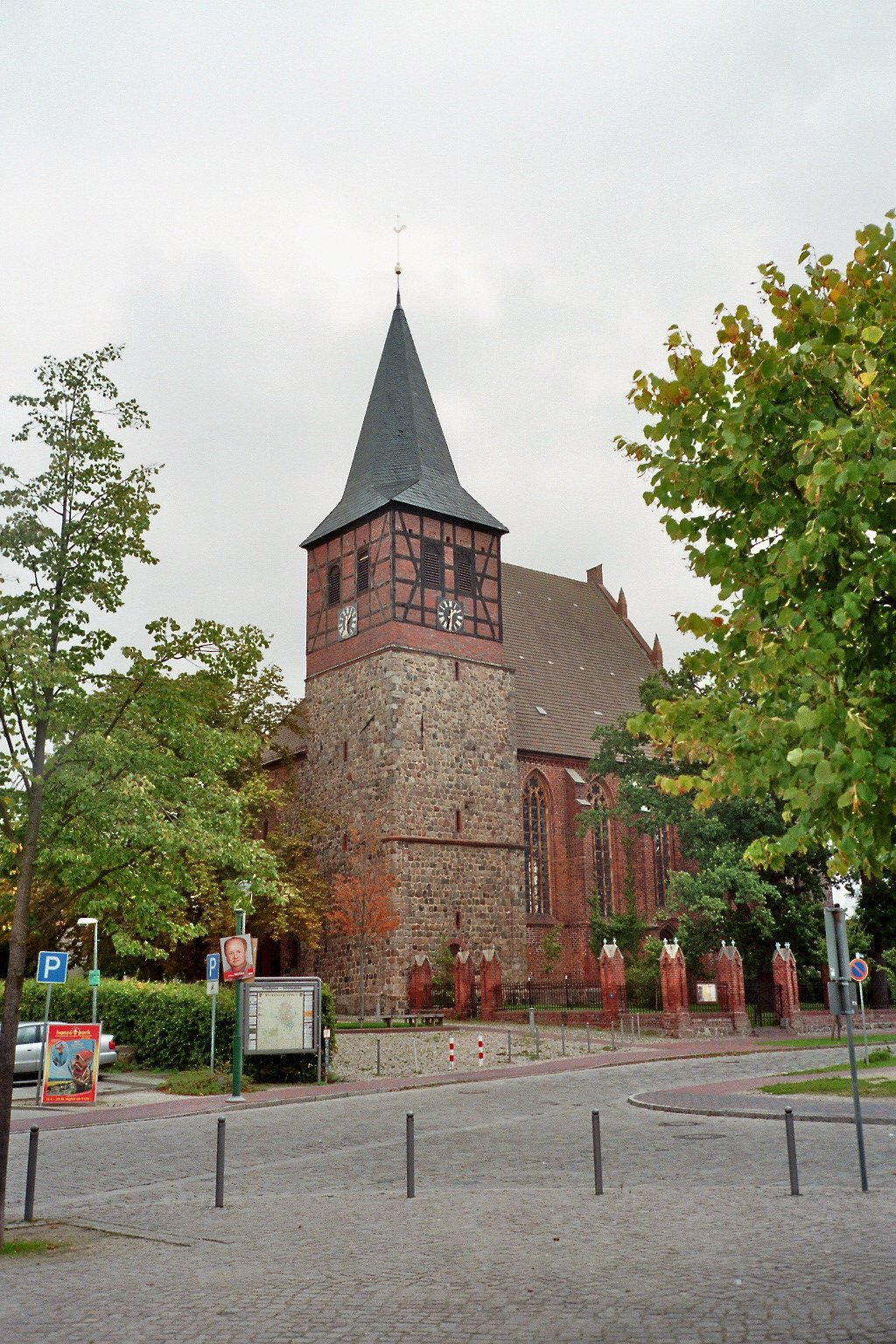 Pfarrkirche von Strasburg (Uckermark) in Mecklenburg-Vorpommern (Feldsteinbau mit Doppelturmanlage im Westen um 1250 begonnen, 1450 durch hochgotische Halle in Backstein verändert, 1865 verändernde Sanierung im neugotischen Stil, 1935 Gesamtrestaurierung des Innenraumes)